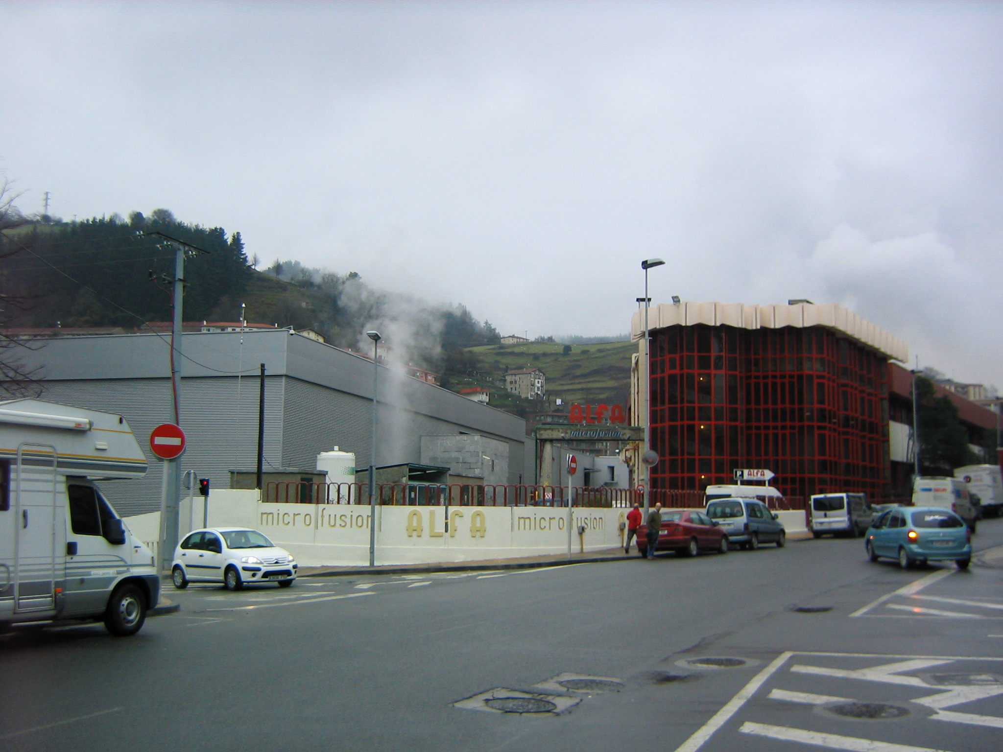 Fachada principal de Alfa Microfusión en Eibar (guipúzcoa) País Vasco (España).